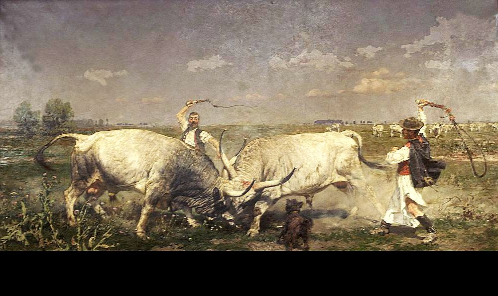 Párbaj. Vastagh Géza festménye